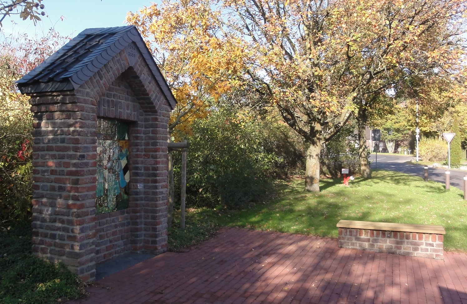 Erinnerungsstätte zum Vertrag von Vinnbrueck 1284 bei Tönisberg (Kempen Niederrhein)